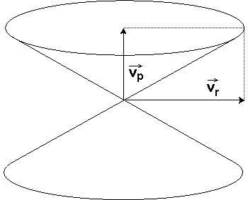 Kaokoonus